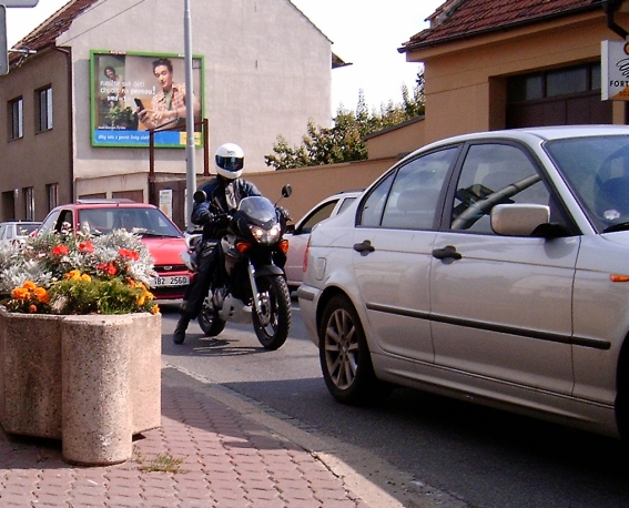 Provoz v Hlavní ulici často končí v kolonách. Ulice Hlavní je zkratkou do Bystrce z Králova Pole, ale i čtyřproudá silnice vedle - Svratecká - bývá v pracovní dny ráno zahlcena.